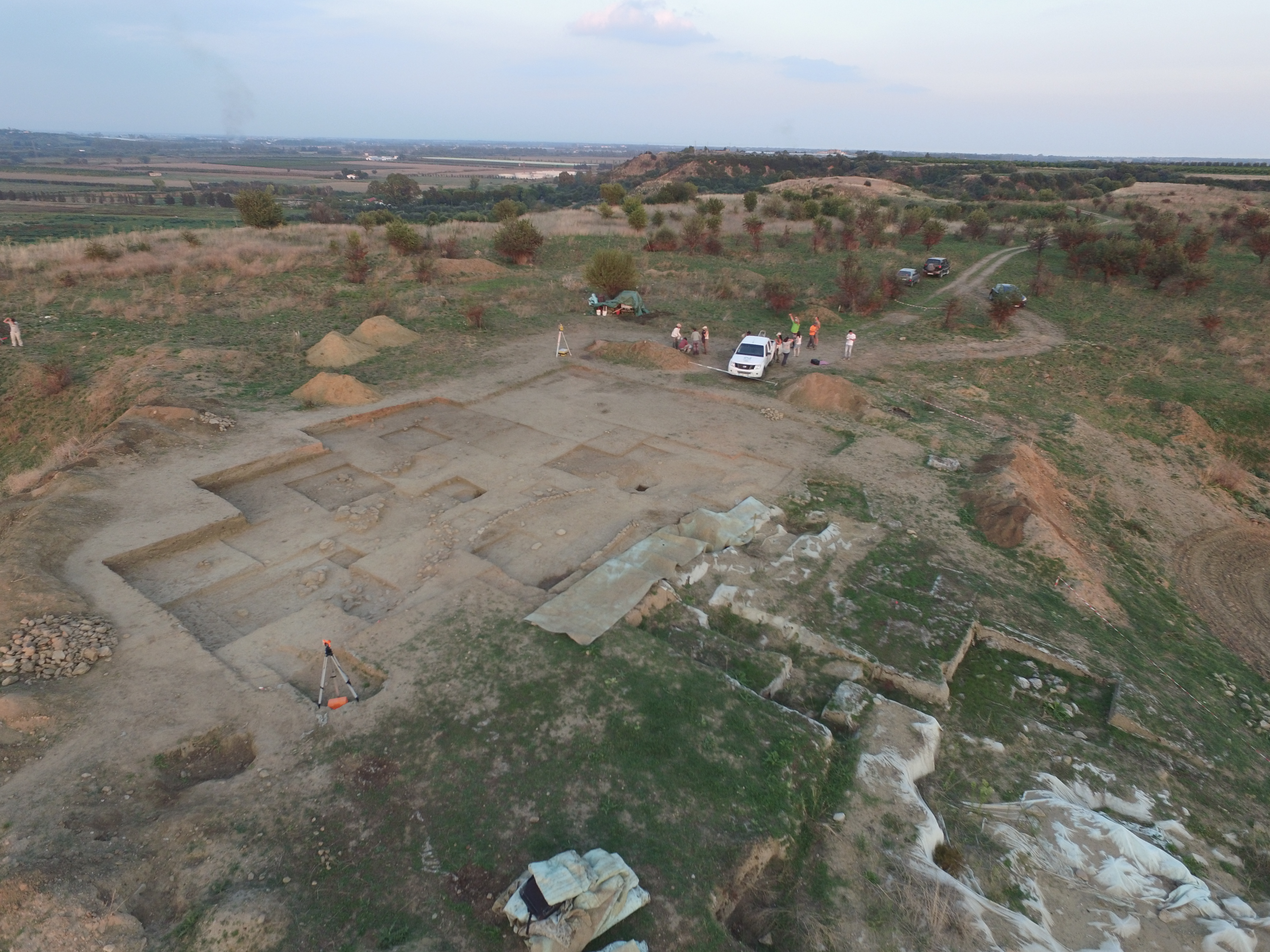 Prise de vue en drone sur le site archéologique de l'Incoronata di Pisticci, et sur le secteur 1 en cours de fouille par l'Université Rennes 2